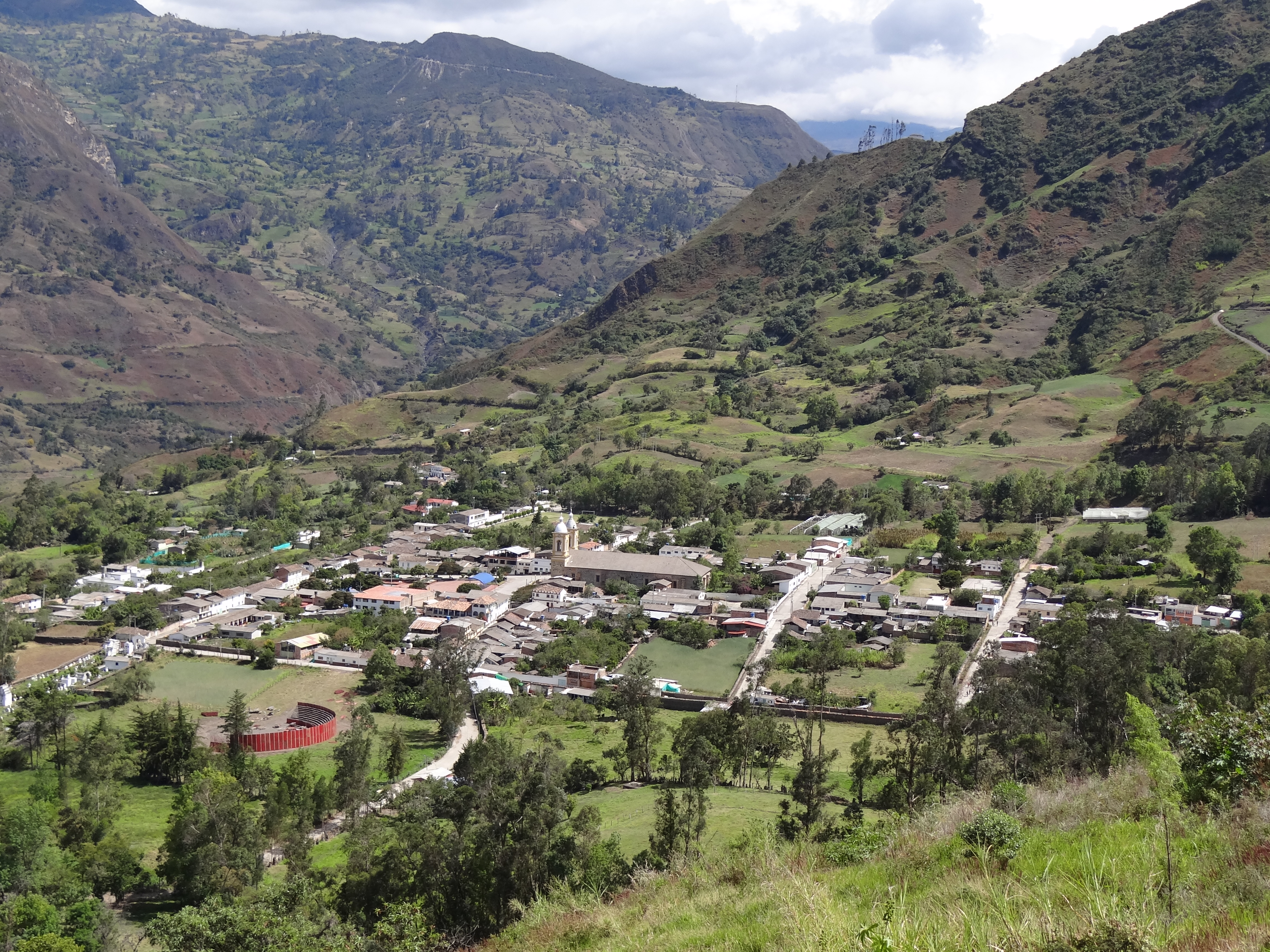 Área urbana del municipio de Guacamayas, departamento de Boyacá, Colombia